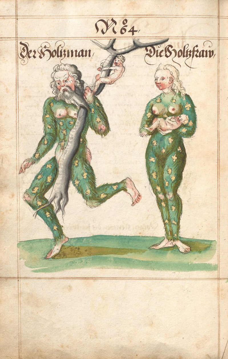 Germanisches Nationalmuseum Nürnberg, Handschrift Merkel 271 Die weil dieses Hievorbemeltes Schempart Buch', fol. 134v